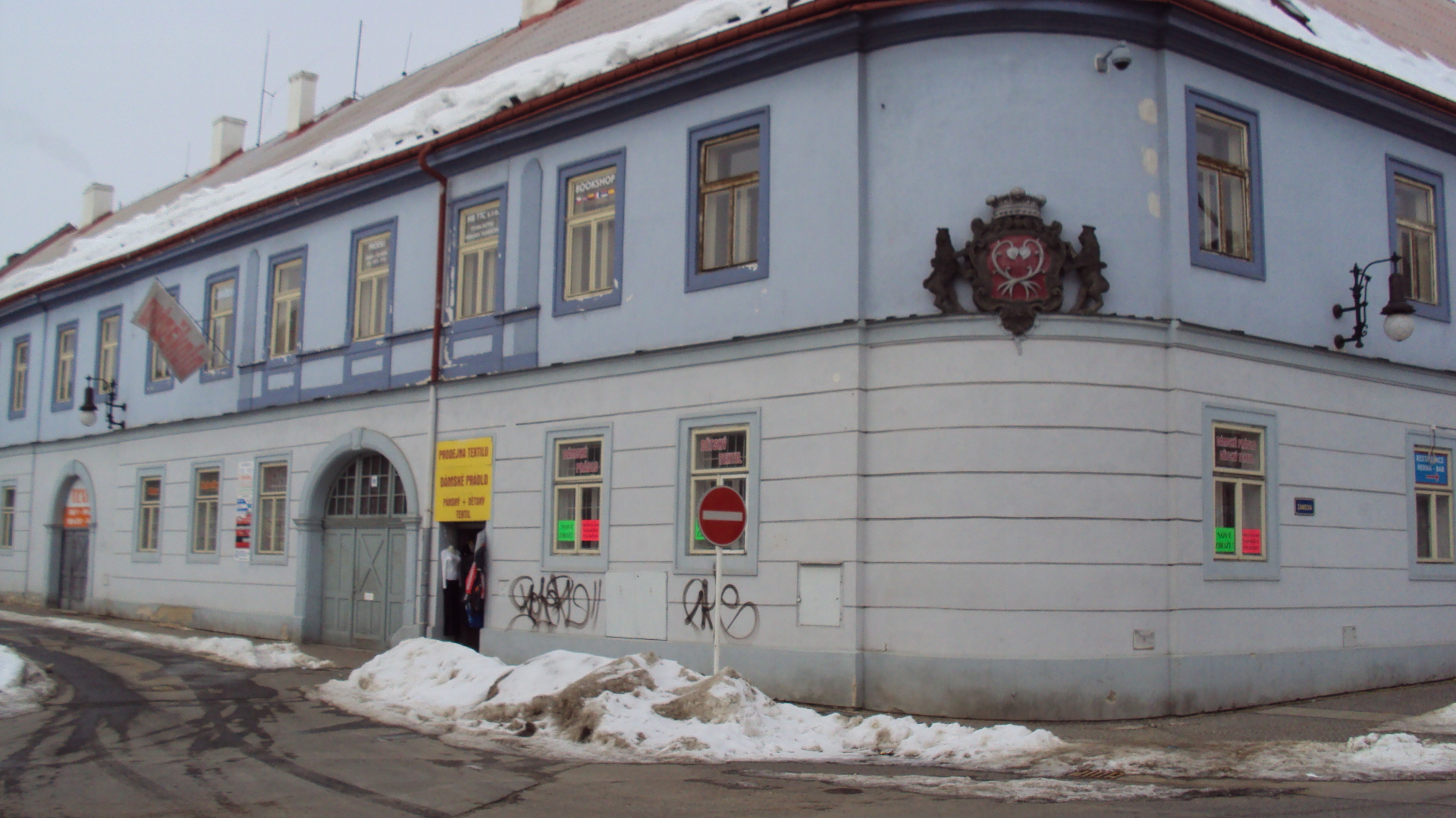 Kounicův dům, kdysi škola, úřady, dnes obchůdky